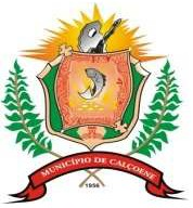 Brasão de Armas do município de Calçoene - AP - Brasil.